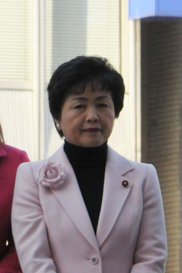 高木美智代衆院議員、新宿西口での街頭演説。